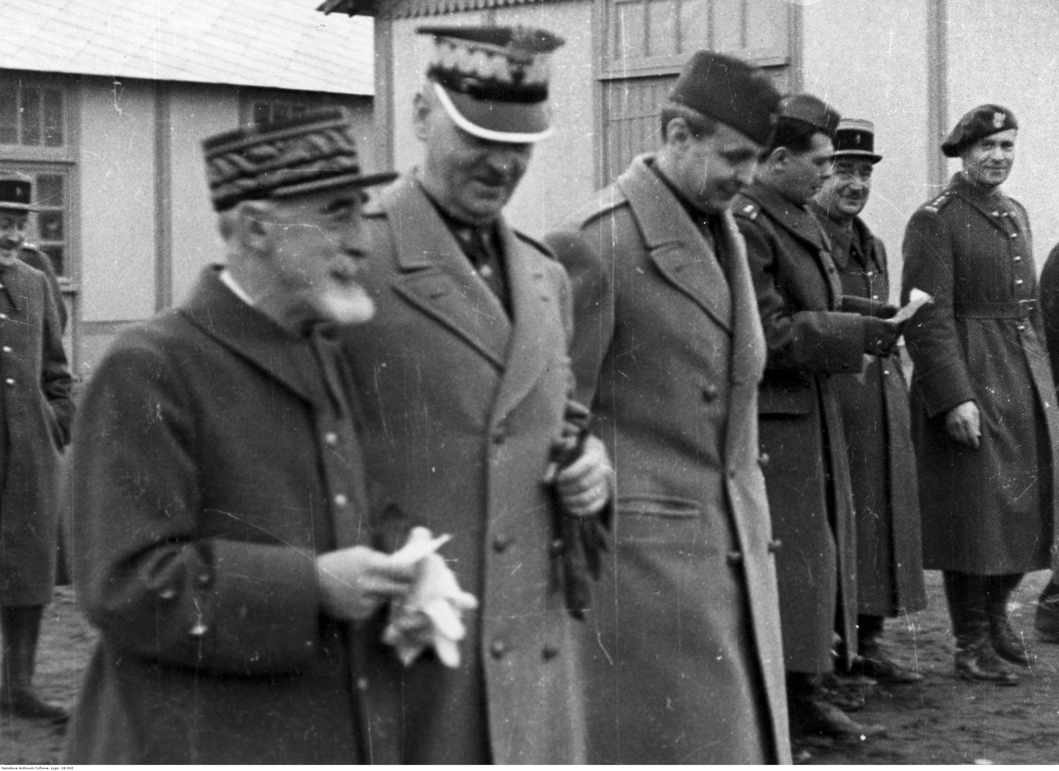 Wizyta Naczelnego Wodza gen. Władysława Sikorskiego w obozie w Coetquidan. Od lewej: gen. Louis Faury, gen. Władysław Sikorski, płk dypl Aleksander Kędzior, NN, NN, płk Zygmunt Bohusz-Szyszko. Archiwum Fotograficzne Czesława Datki. Sygnatura: 18-242